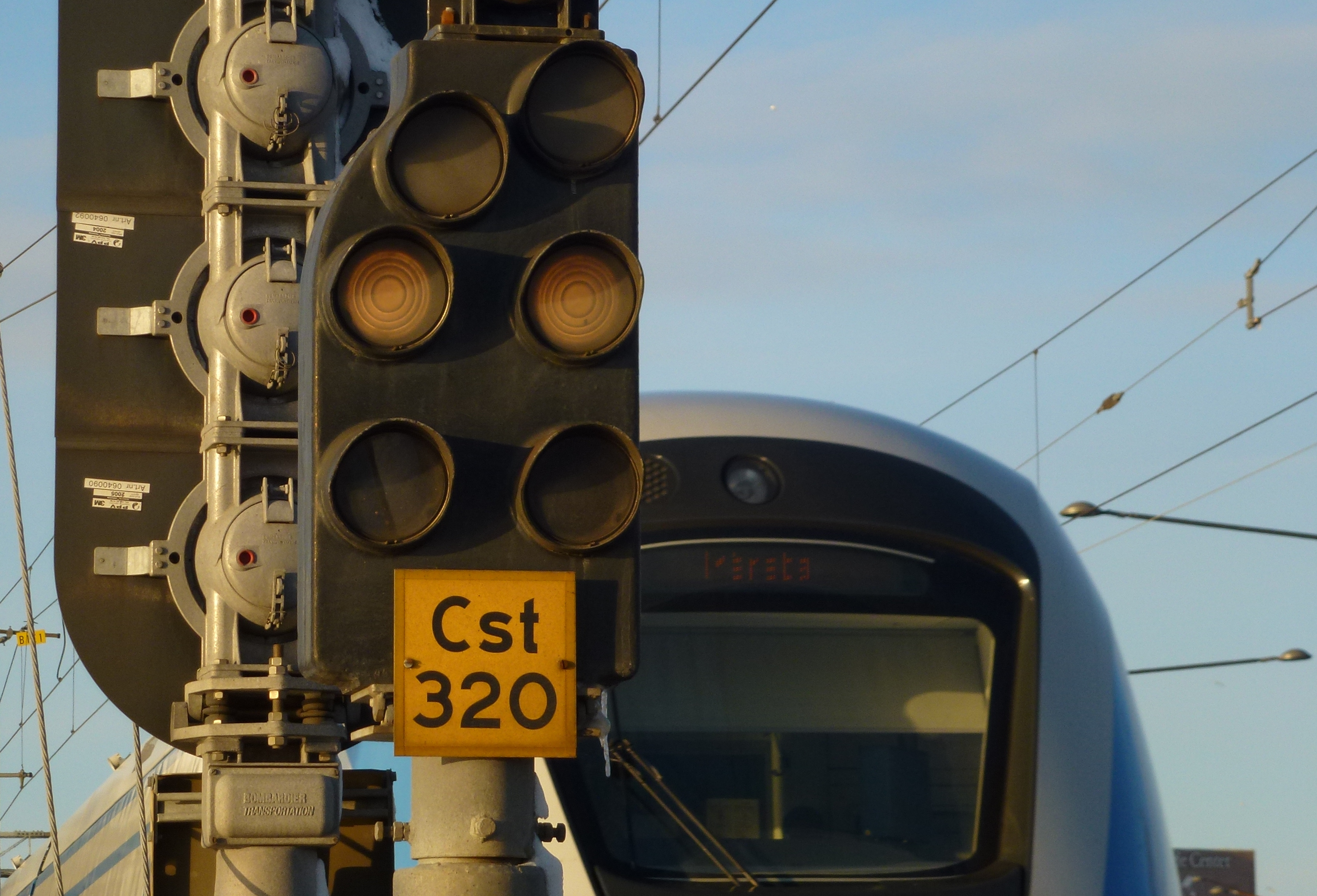 Stockholms centralstation skylt "Cst 320"